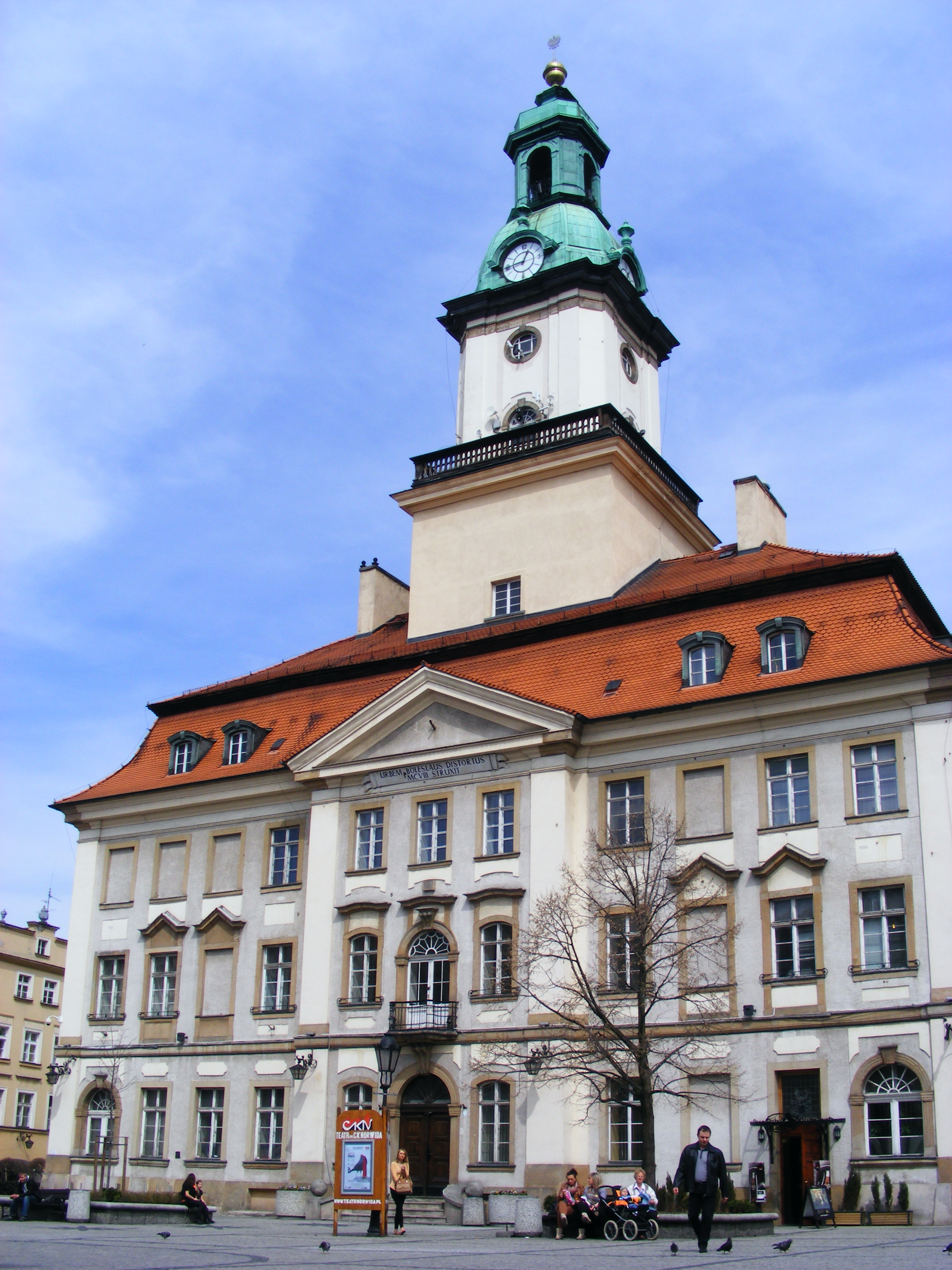 Jelenia Góra, Plac Ratuszowy - ratusz, 1744-1749